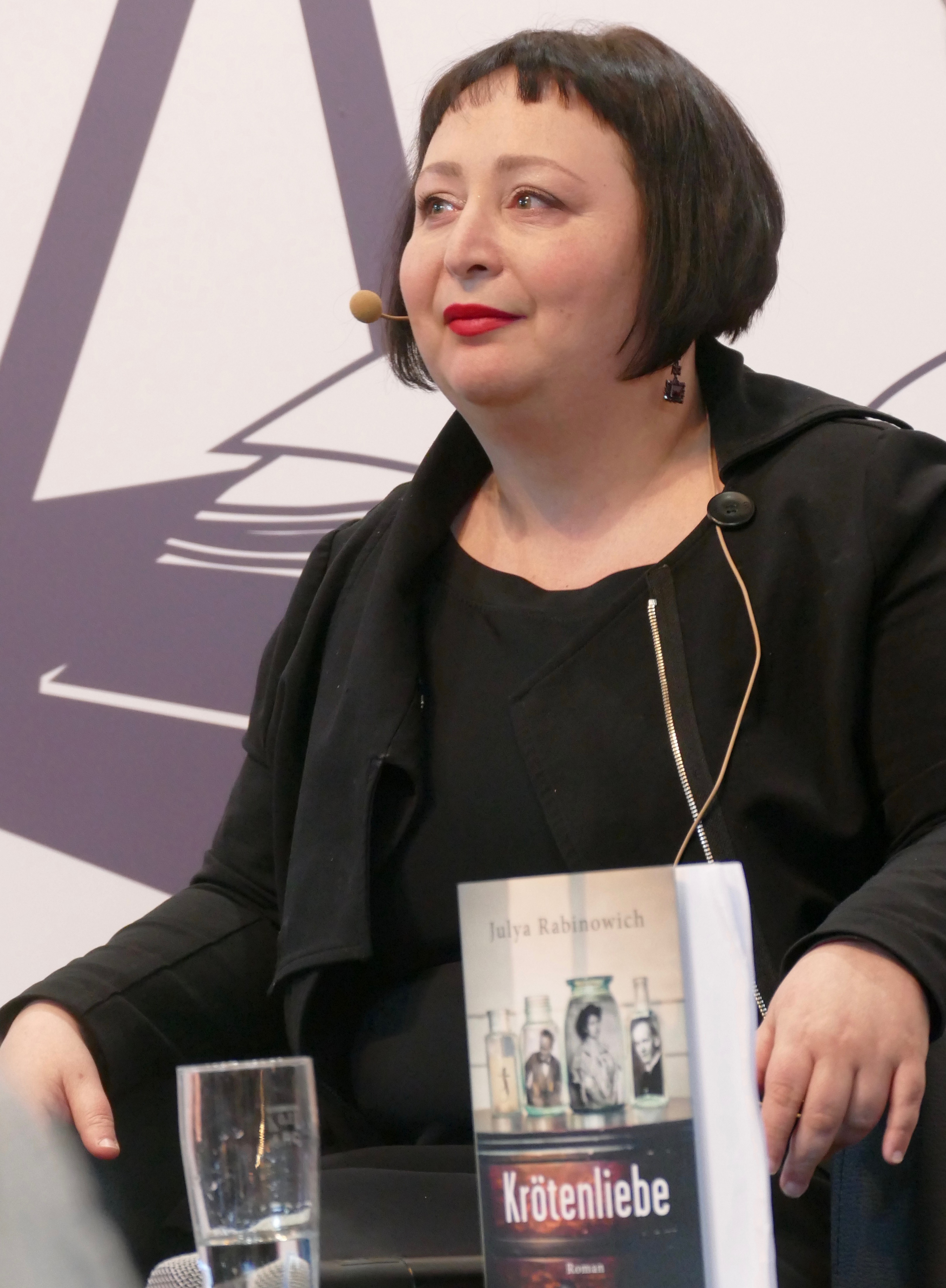 Julya Rabinowich stellt ihren Roman "Krötenliebe" auf der Leipziger Buchmesse 2016 vor.